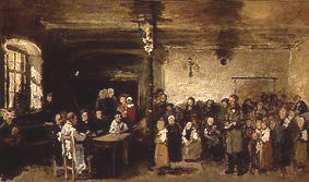 Duerfschoul vu Kolpech - Tableau vum ungaresche Moler Mihály Munkácsy